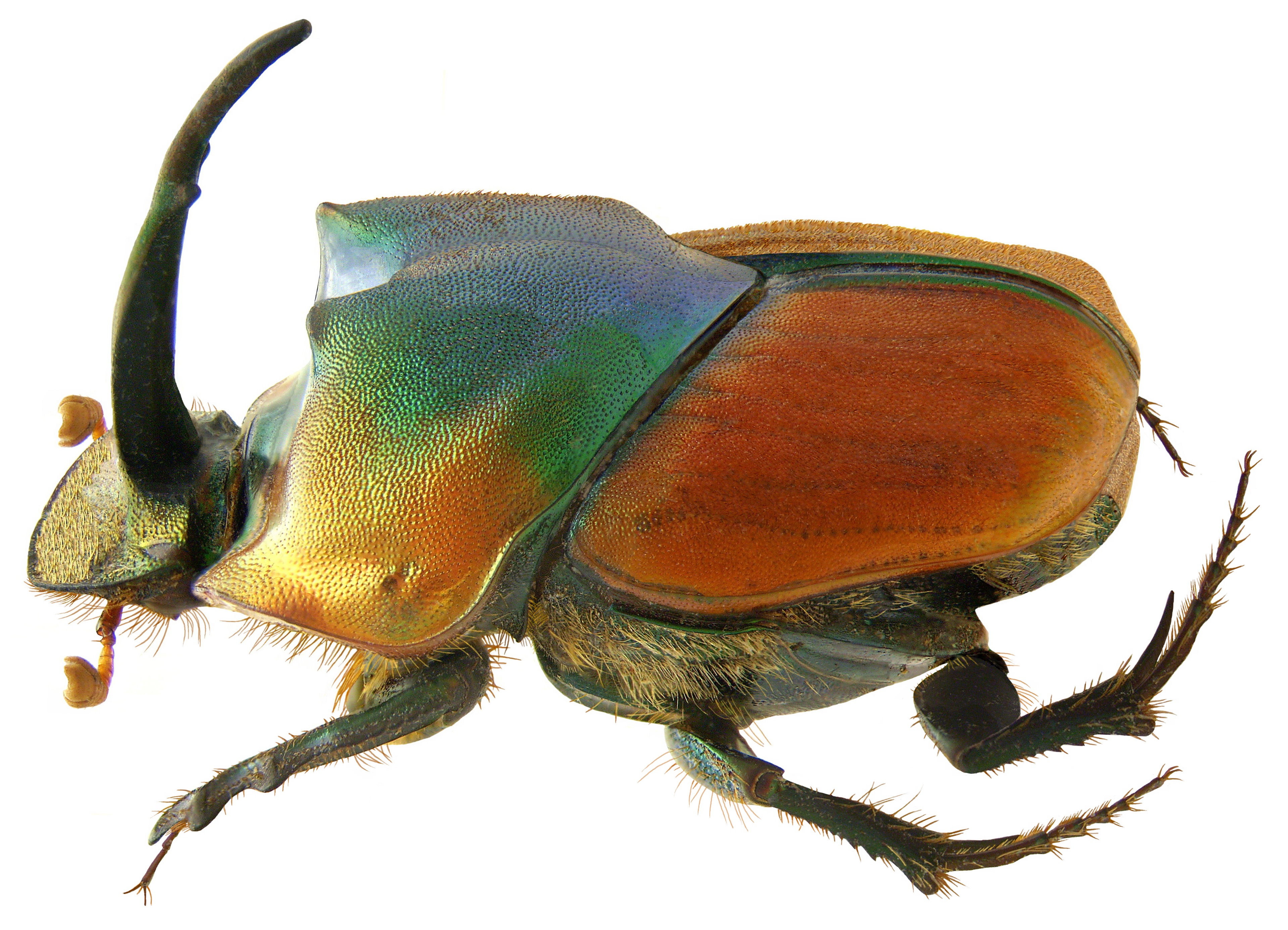 Familie: Scarabaeidae Groesse: 16,4 mm Fundort: Indien, Bangladesch det. J.Scheuern, 1997 Photo: U.Schmidt, 2009